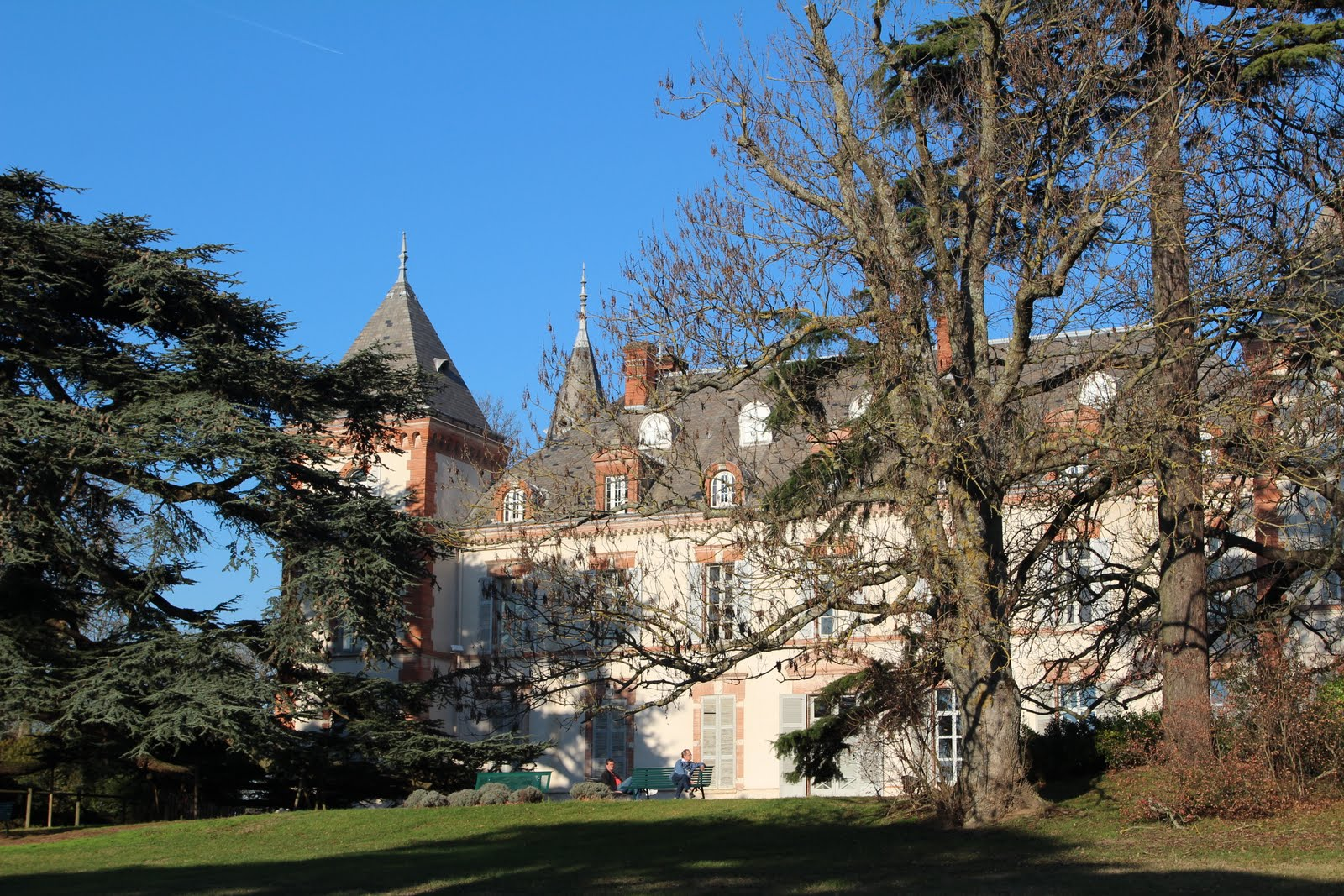 Aufréry